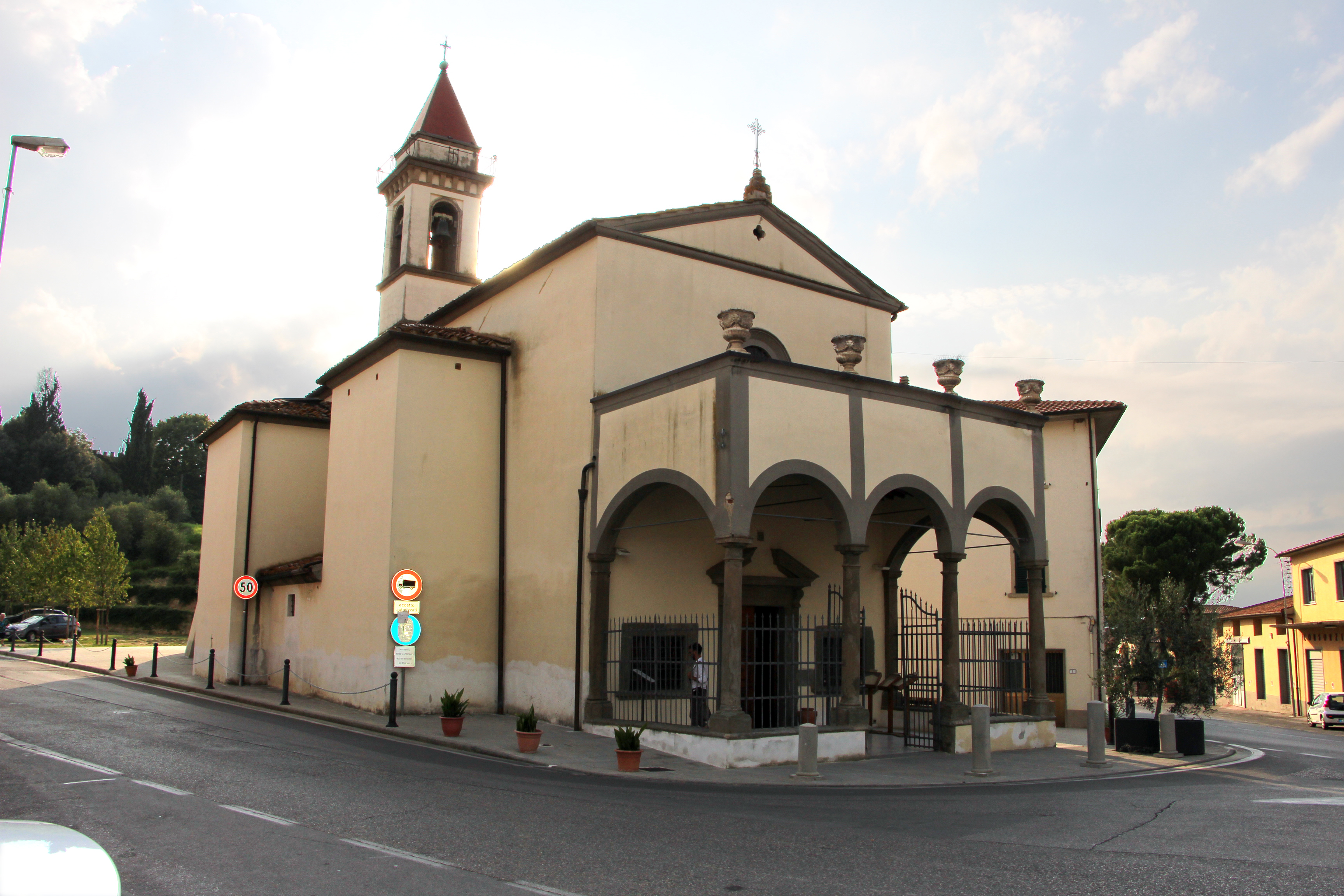 Cerreto Guidi The making of this document was supported by Wikimedia CH. (Submit your project!) For all the files concerned, please see the category Supported by Wikimedia CH.